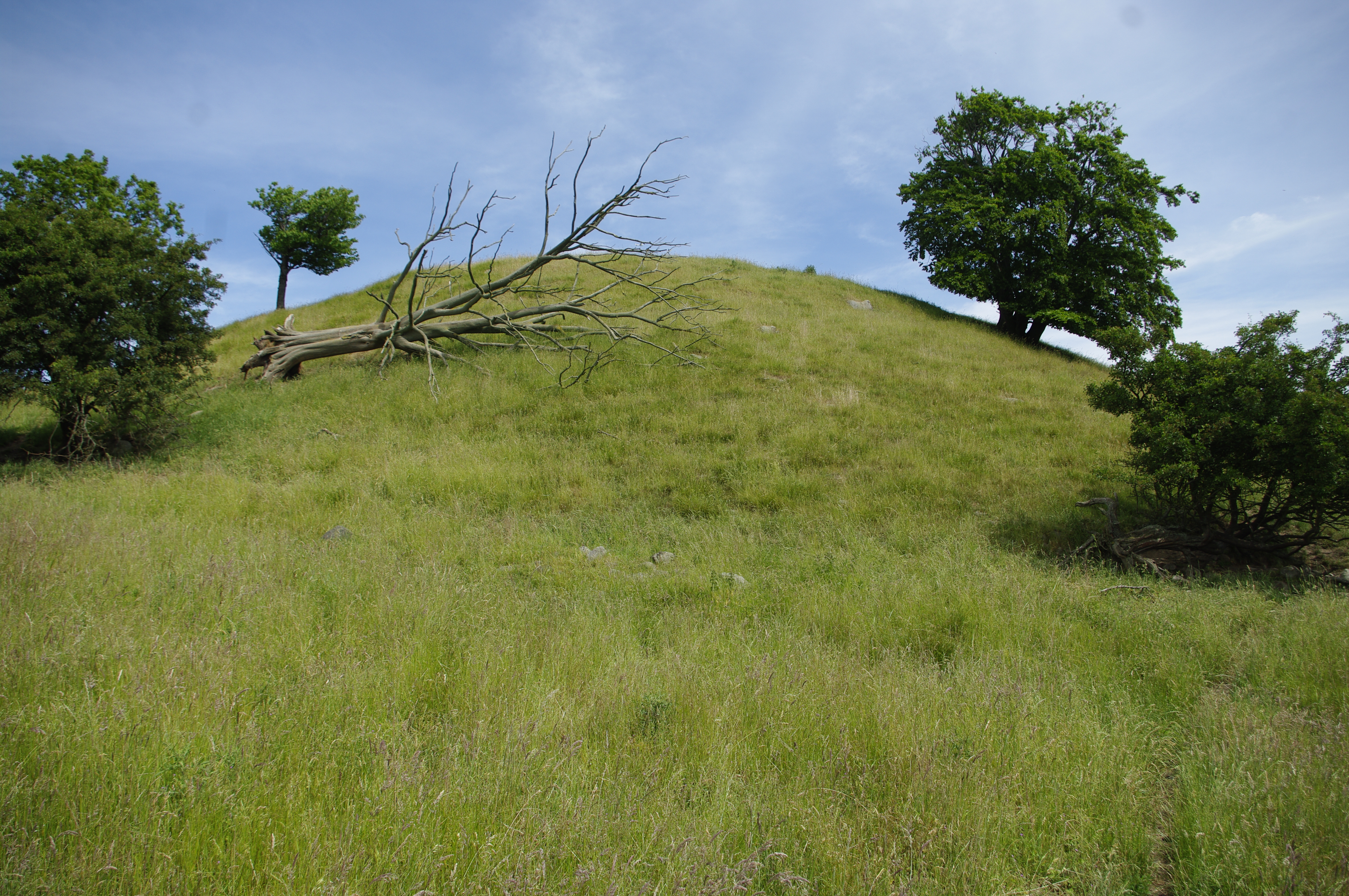 Kungsbacken i Börringe socken i Skåne, Sverige är en rest efter en borg från ca 1200.